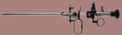 Uretrotomo